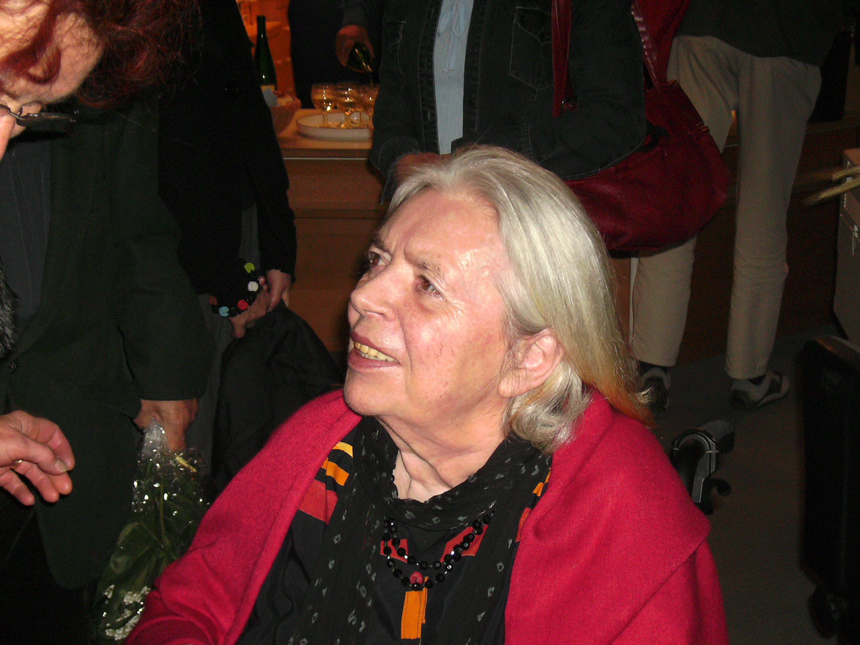 Porträt-Foto Felicitas Frischmuth